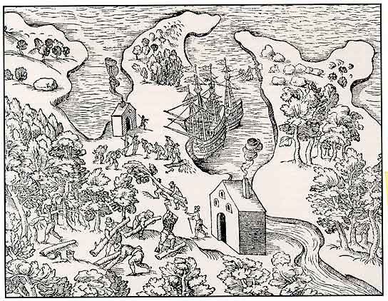 Overvintringen: Sjøfolkene fra "Enhiørningen" og "Lamprenen" forbereder vinterhavn i "Jens Munk´s Bay" ved vestsiden av Hudson Bay. Munks beretning om ekspedisjonen og overvintringen 1619/20 står nedtegnet i hans bok Navigatio Septentrionalis fra 1624.